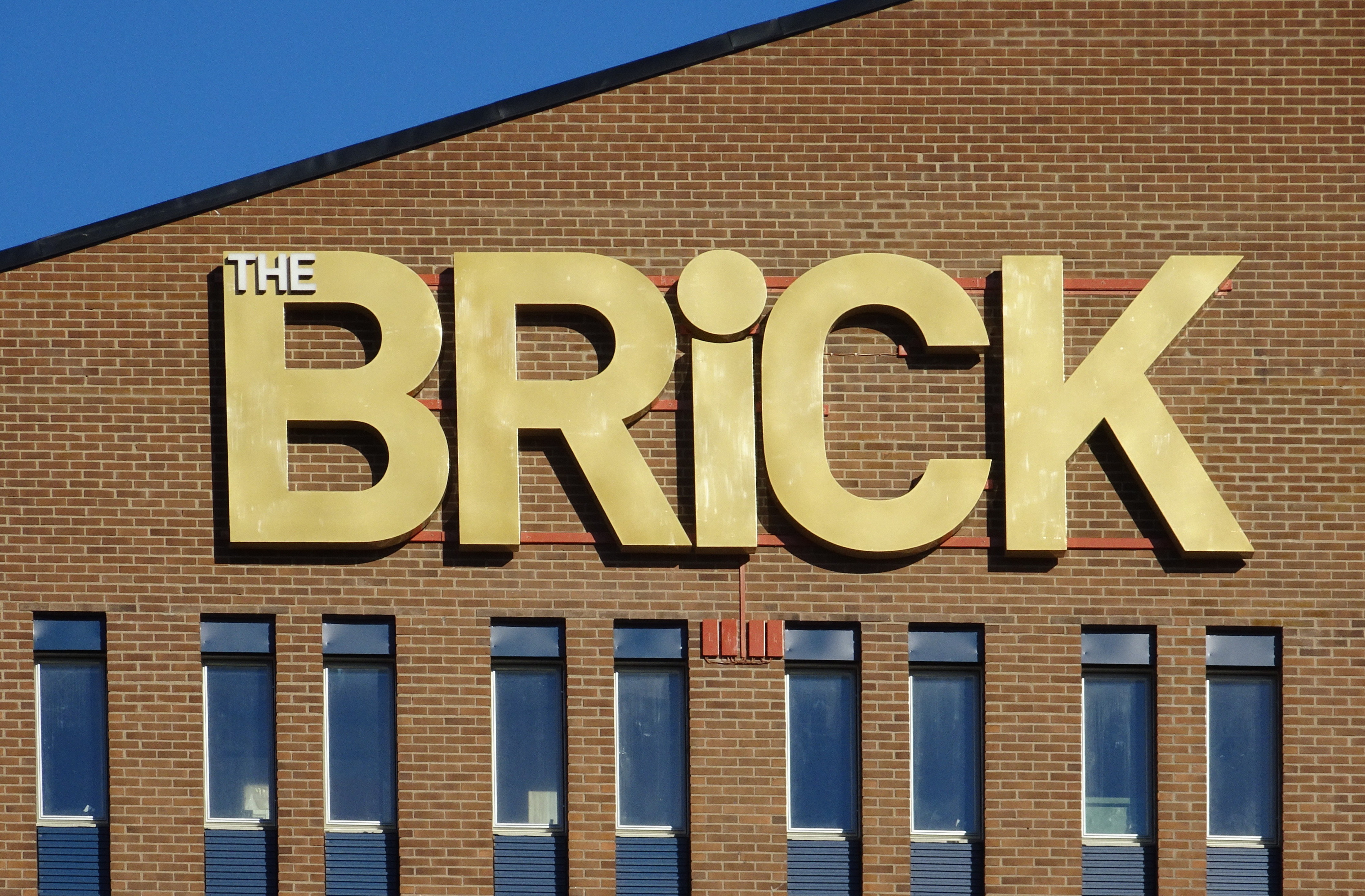 "The Brick" (Gamla LM Ericssons byggnad vid Södertäljevägen)